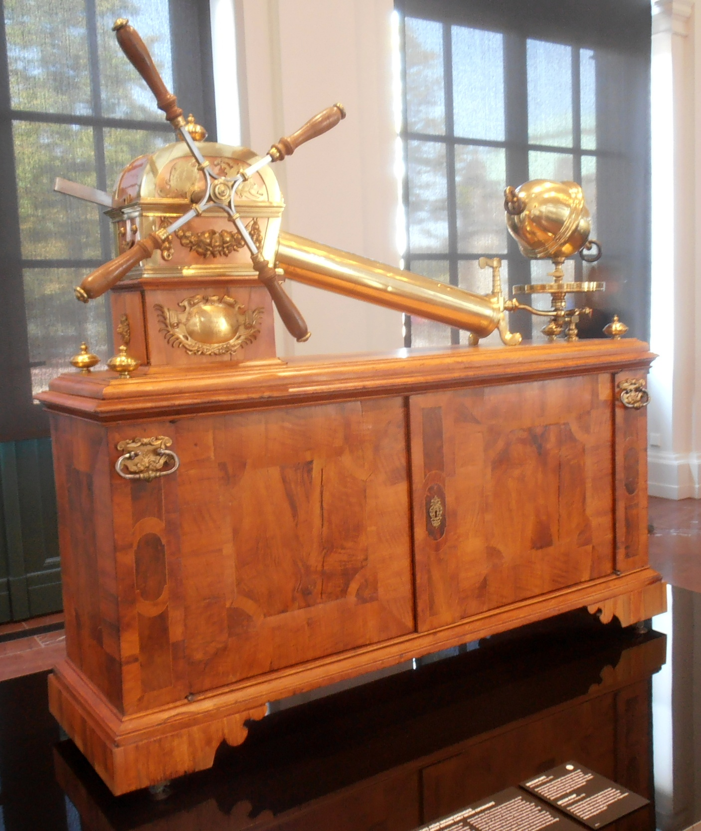 Vakuumpumpe von Jacob Leupold von 1709, erworben von August dem Starken auf der Leipziger Messe Festsaal des Mathematisch-Physikalischen Salons im Zwinger Dresden